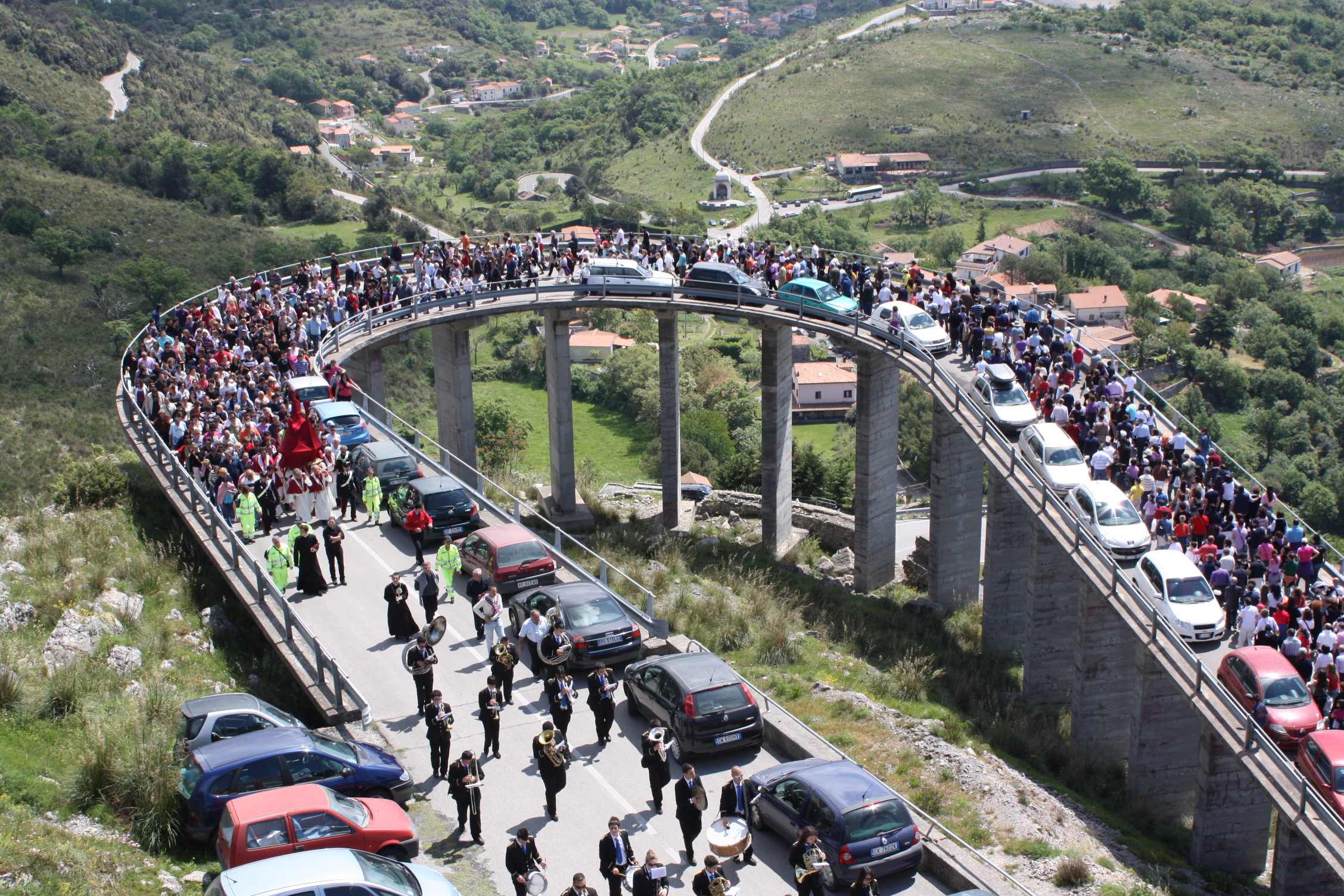 Festa di S. Biagio a Maratea - processione di ritorno